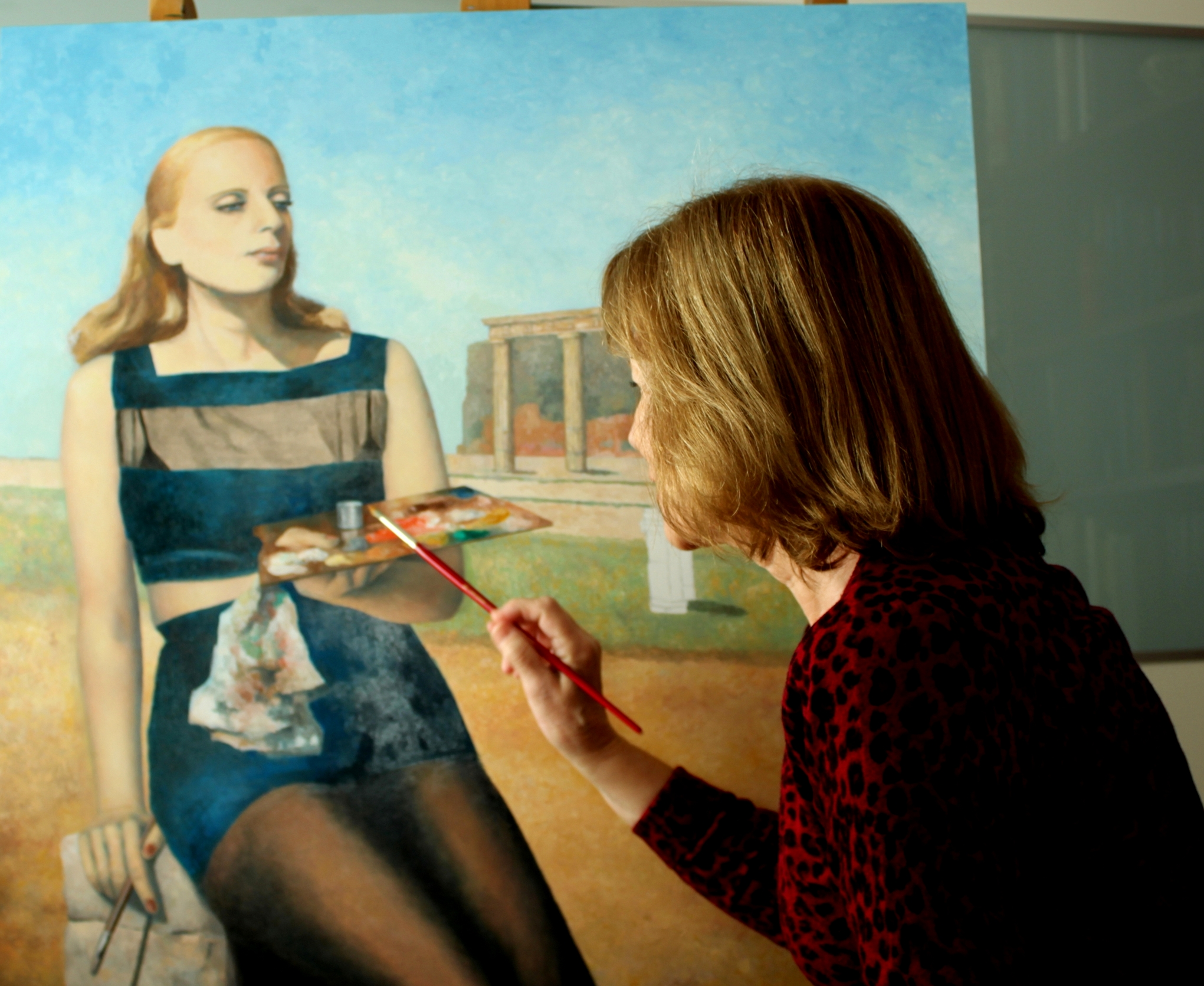 Consuelo Hernández pintando TAMARA DE LEMPICKA